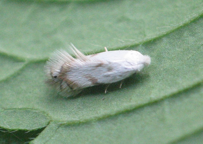 Pseudopostega crepusculella